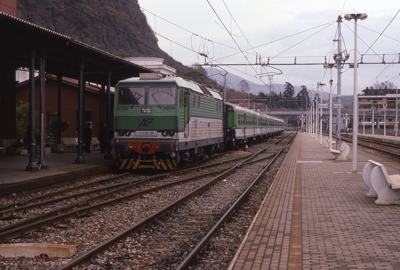 Locomotiva E.630-09 delle Ferrovie Nord Milano in sosta a Laveno-Mombello Nord